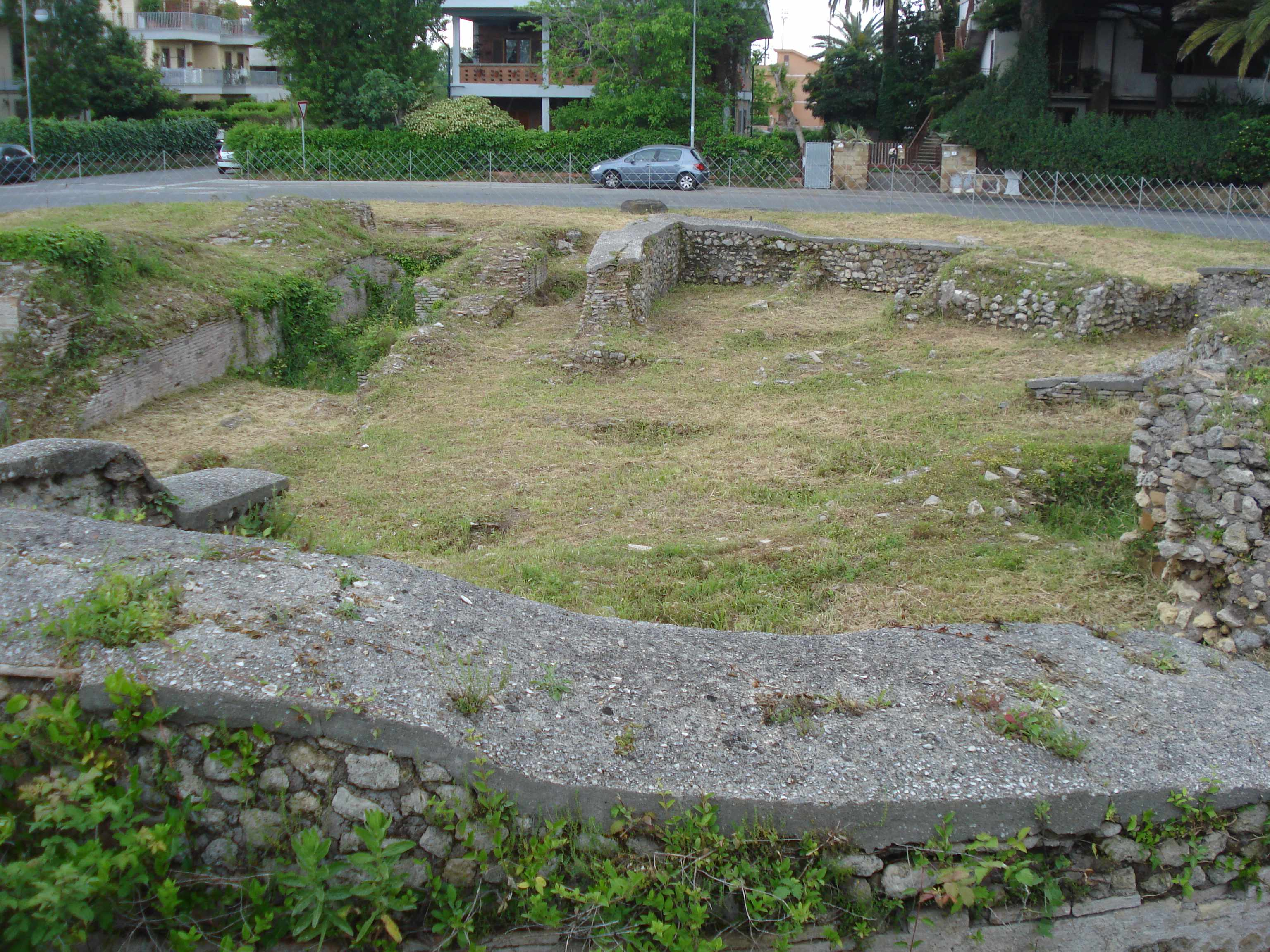 L'orchestra presa dal corridoio mediano, a sinistra la scena, si vedono i setti radiali sottostanti la cavea.